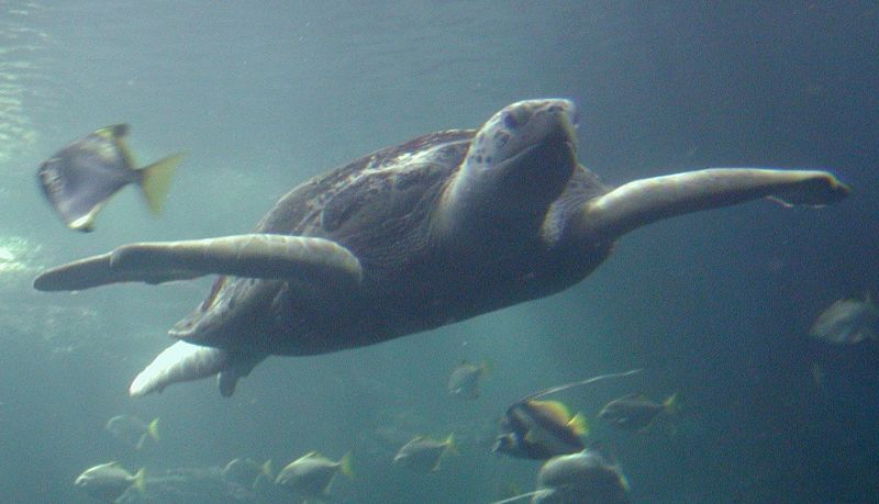 Suppenschildkröte